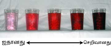 இடமிருந்து வலமாகக் கரைசல்களின் செறிவு அதிகரிக்கின்றது.